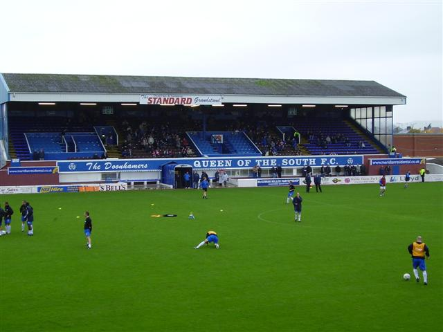 Palmerston Park main stand